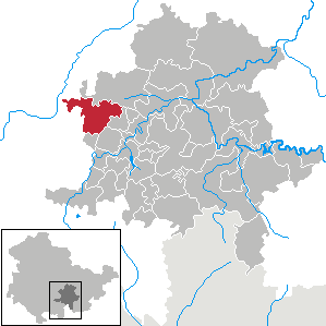 Königsee in Thuringia - District Saalfeld-Rudolstadt